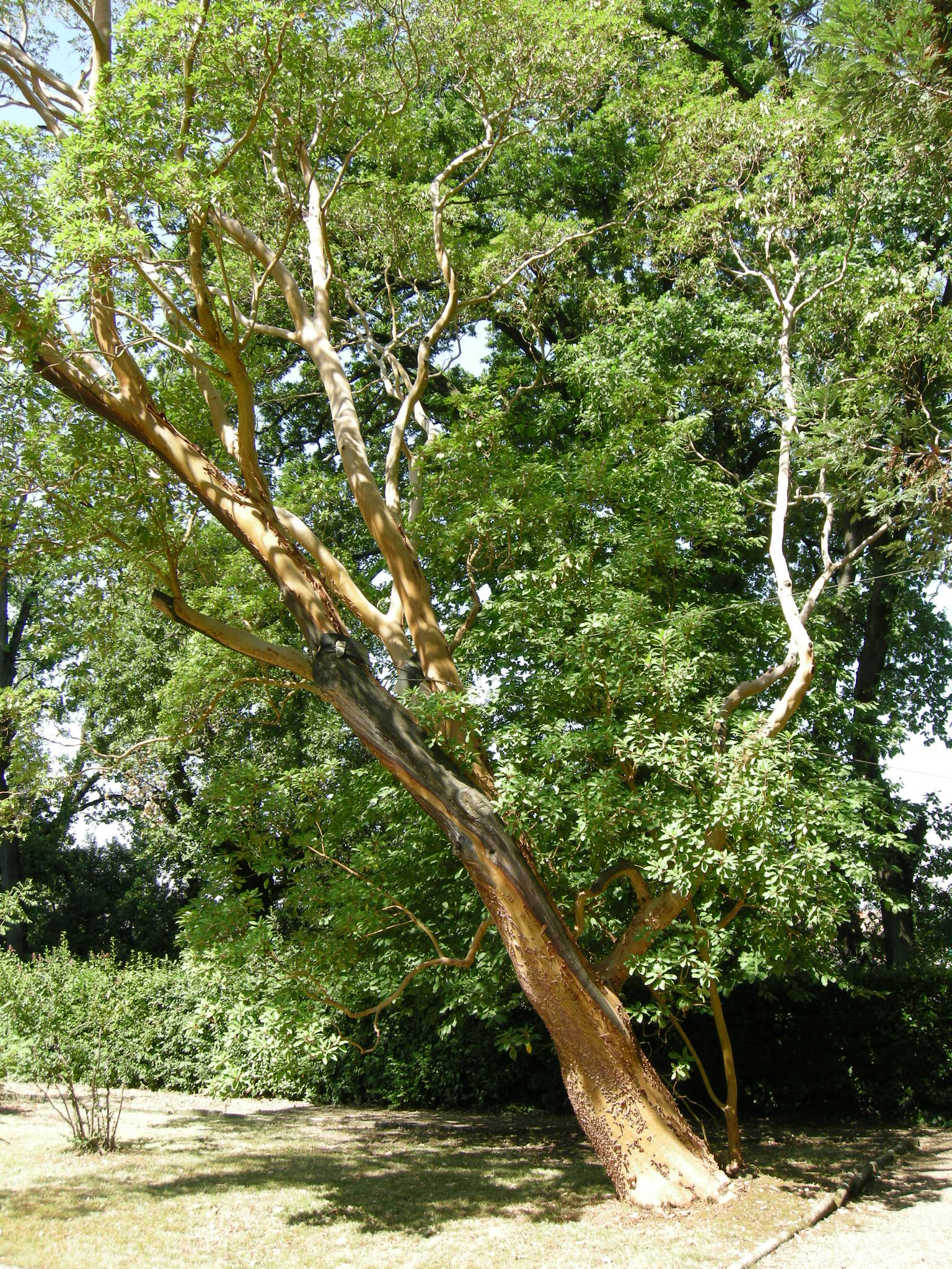 Villa di careggi, giardino, corbezzolo di Grecia